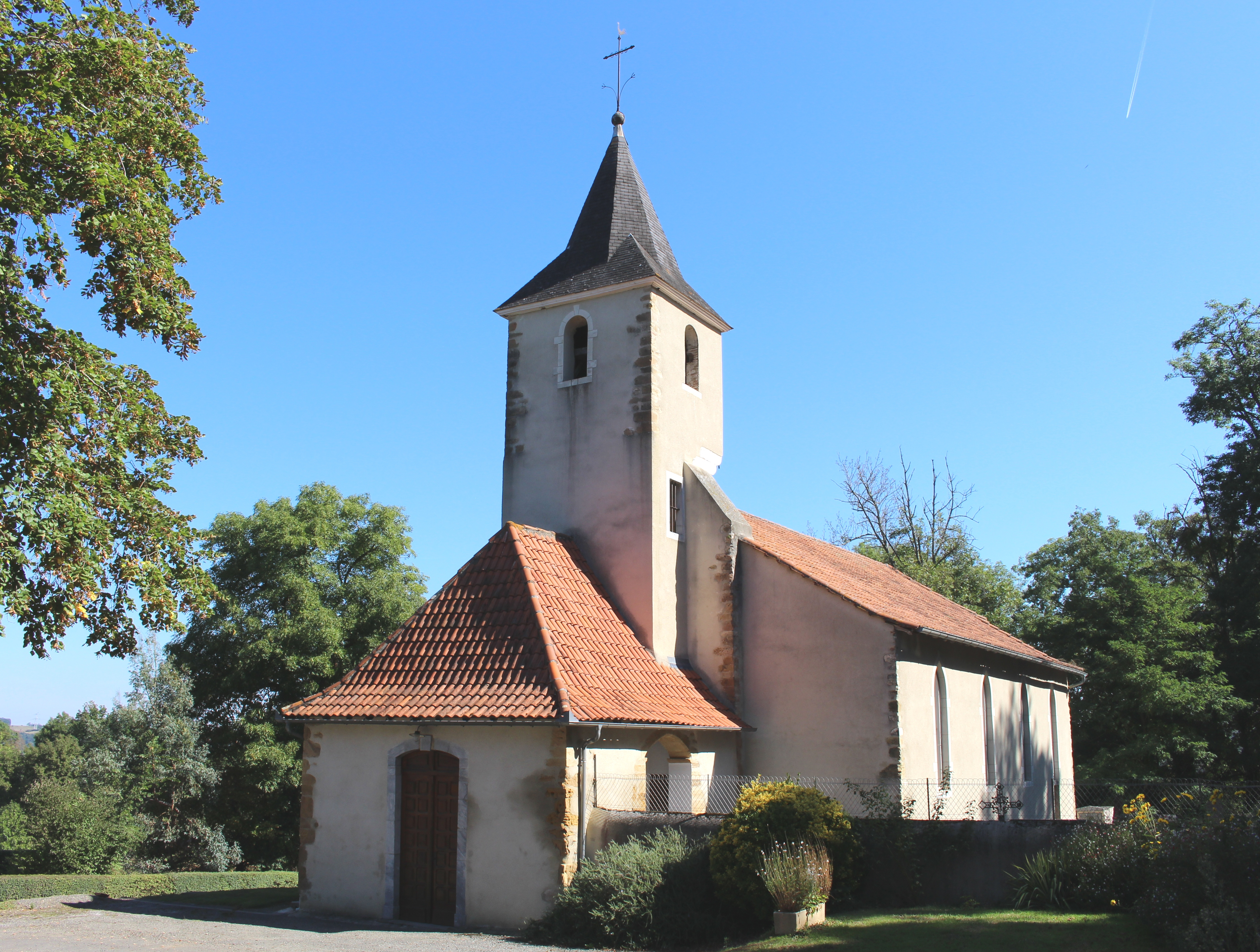 Église Martyre-de-Saint-Jean-Baptiste de Lescurry (Hautes-Pyrénées)